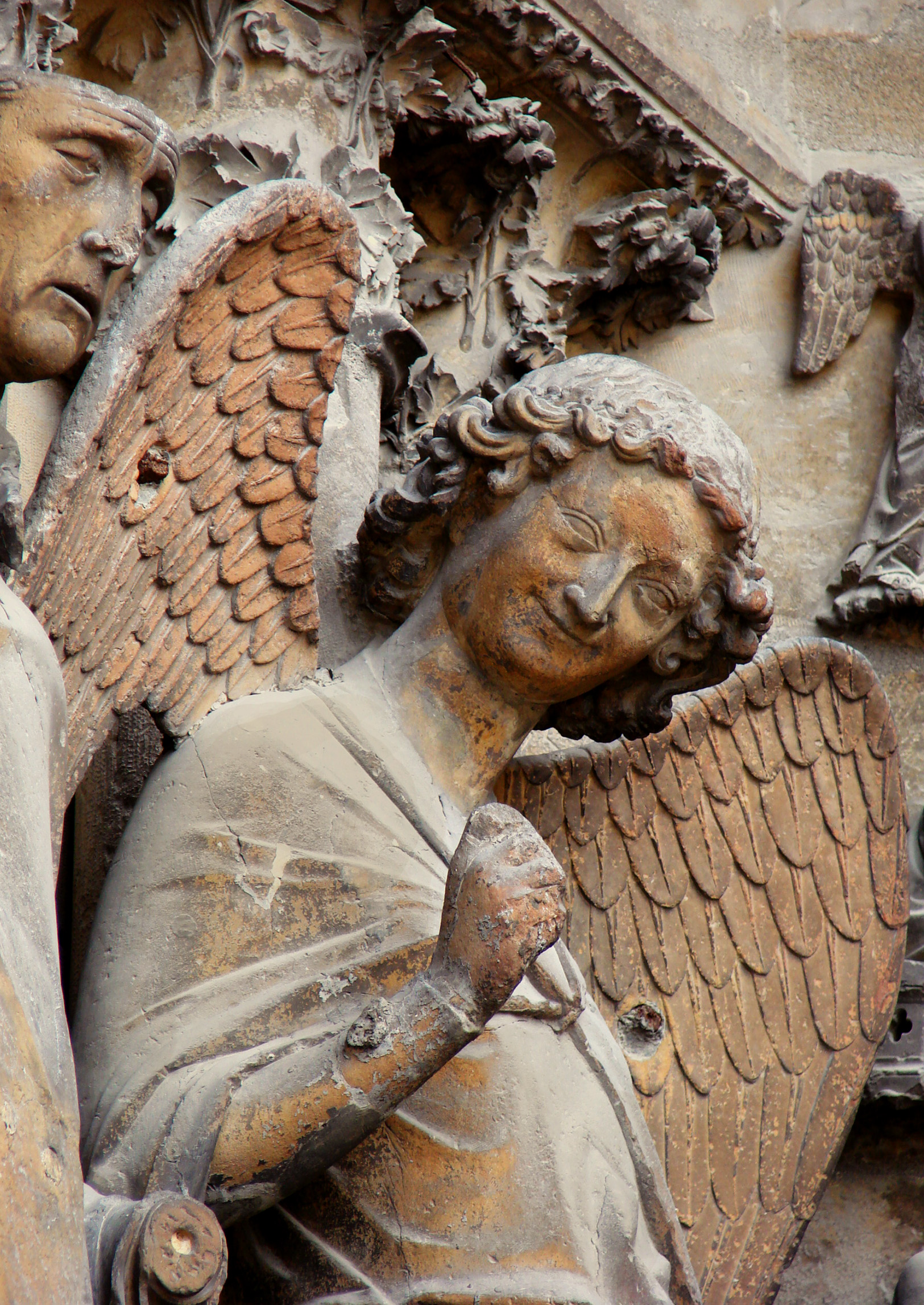 l'Ange au sourire,portail de la cathédrale de Reims,XIIIème siècle, le flanc gauche du portail gauche du façade de l'ouest. (Photo légèrement retouchée pour masquer des altérations superficielles.)